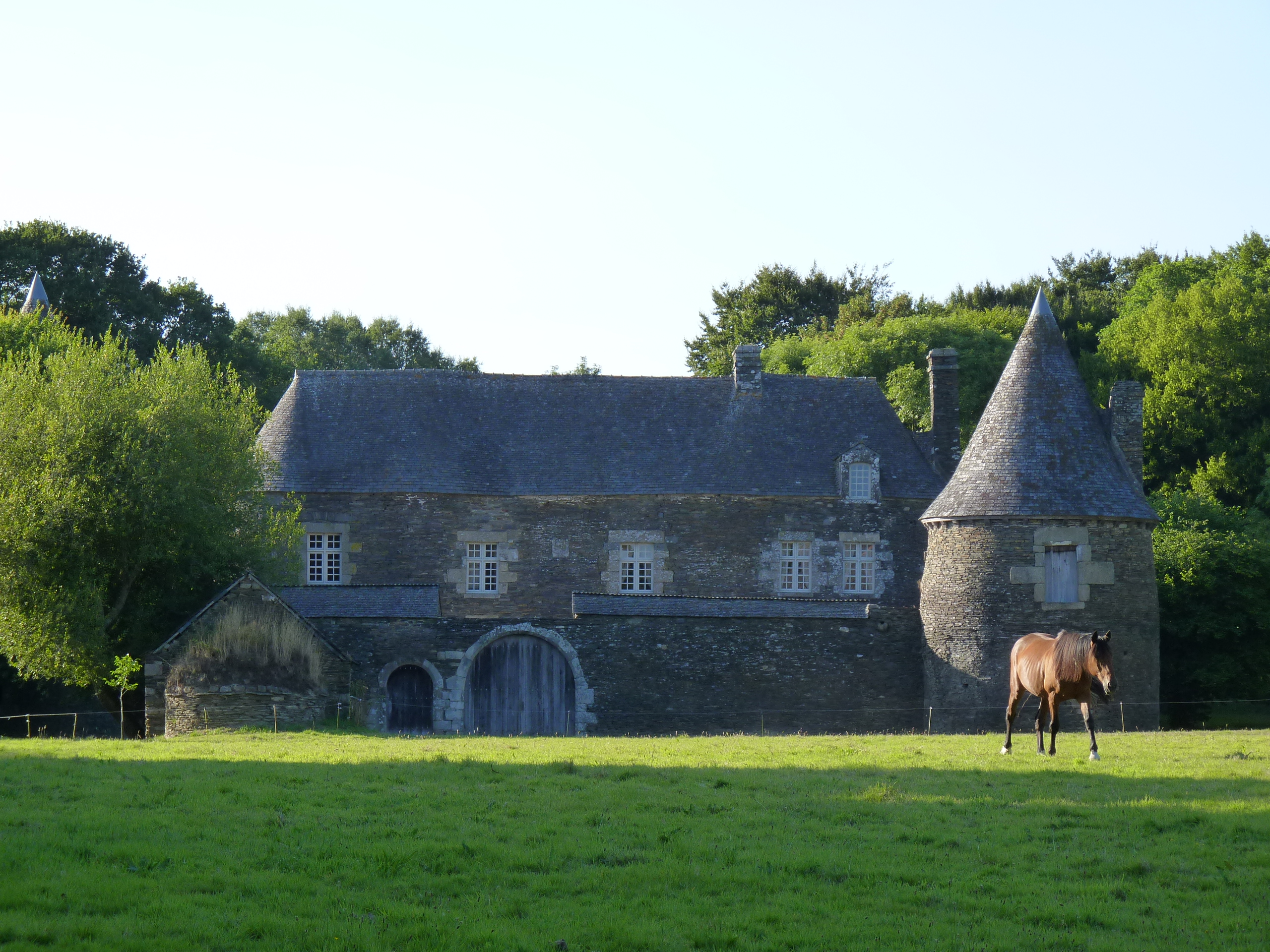 Manoir 16ème et 17ème siècles.